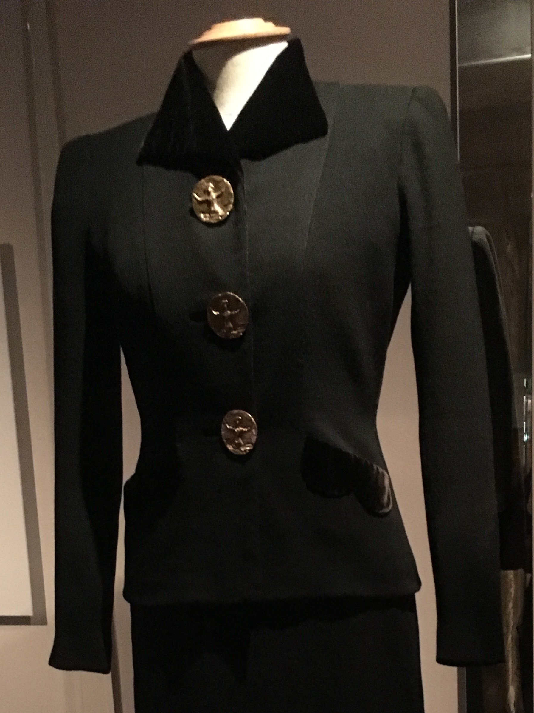 Elsa Schiaparelli, tailleur in lana bouclé, bottoni in bronzo dorato di François Hugo, 1938/39. Modello di Alberto Giacometti. Abito appartenuto a Marlene Dietrich. Berlino, Marlene Dietrich Collection.